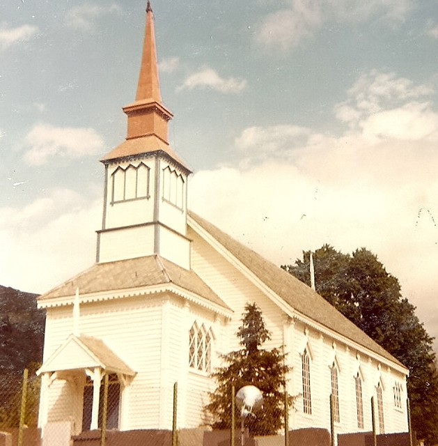 Stårheim kirke